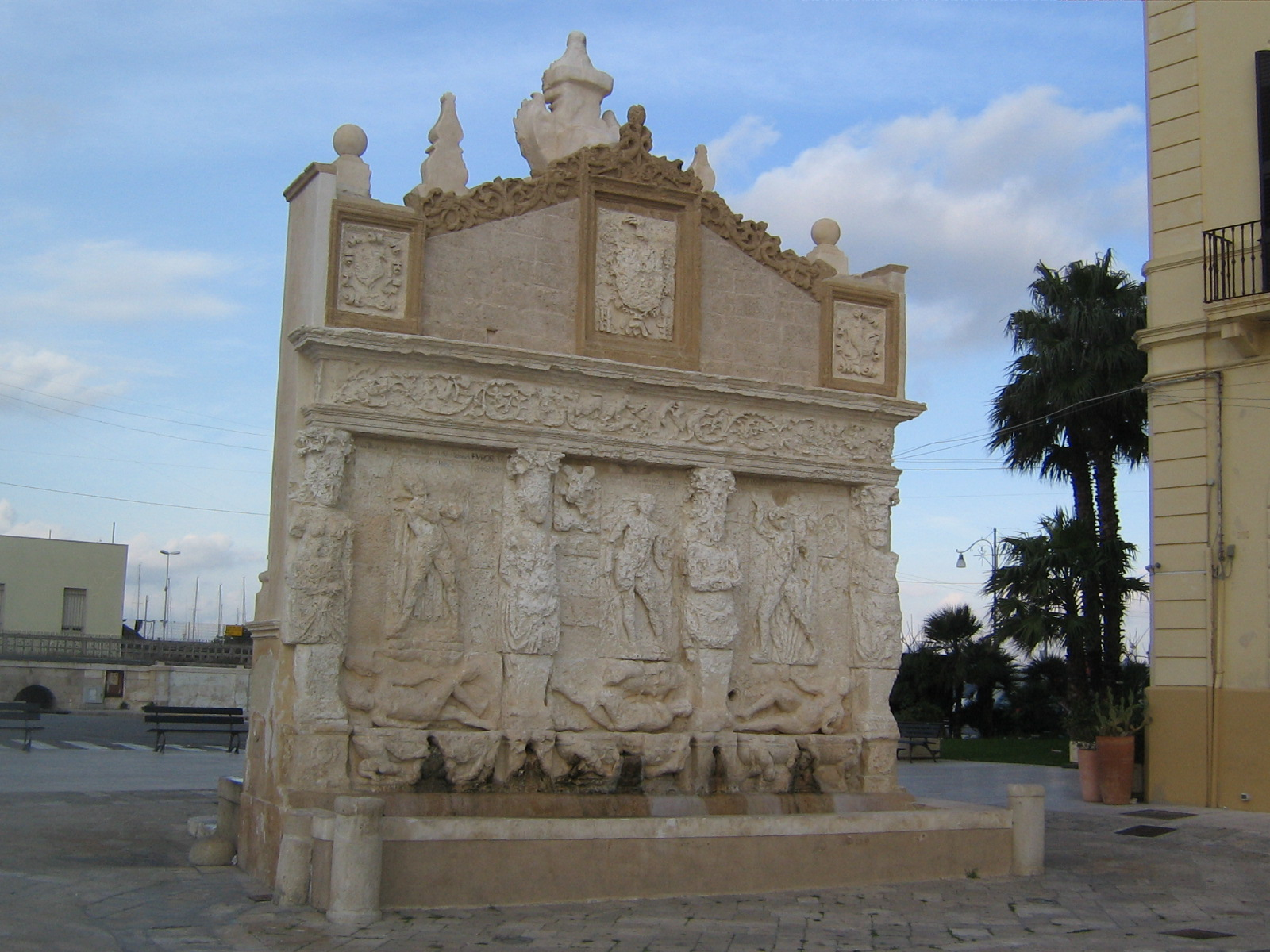 Fontana Ellenistica Gallipoli